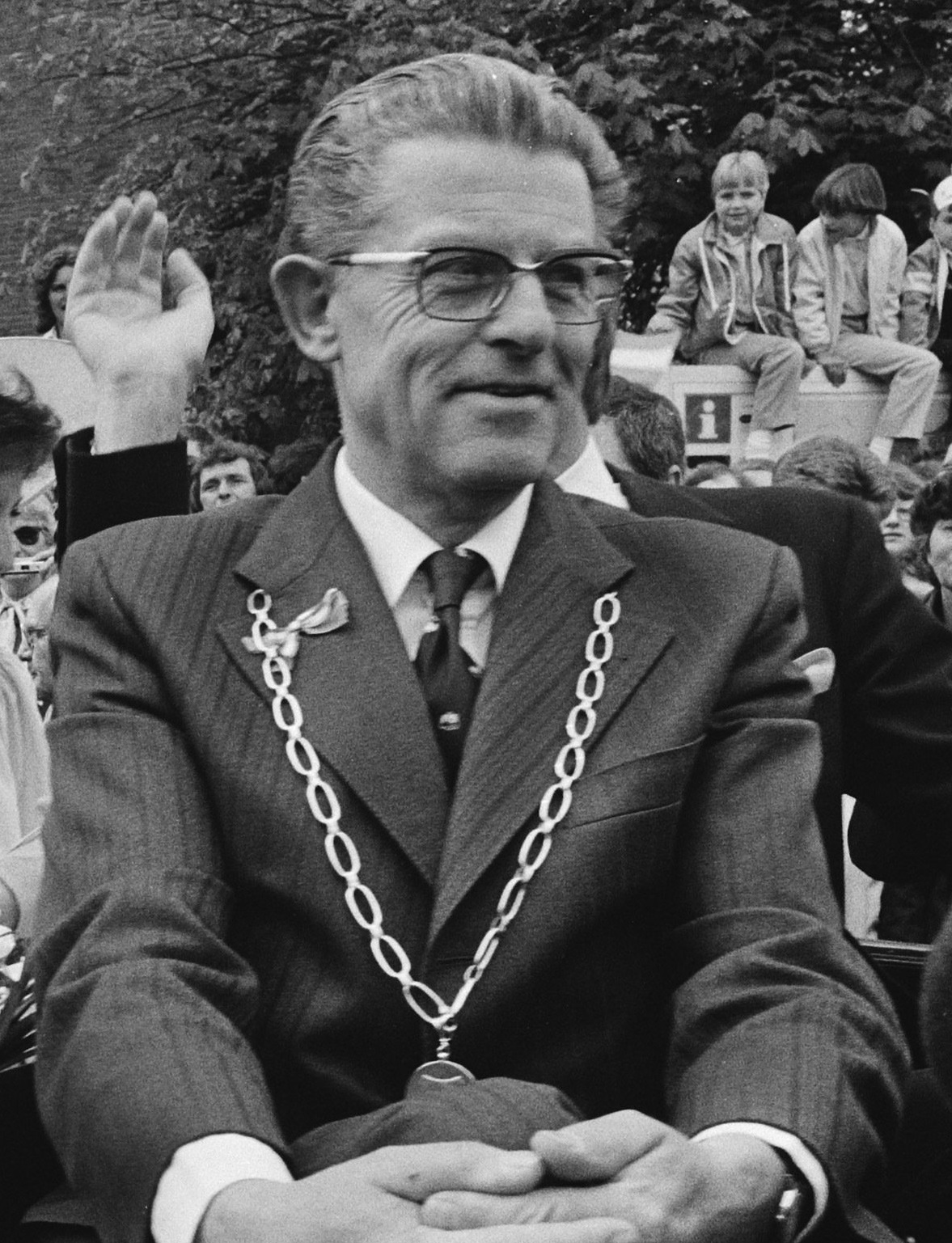 Henk Beuke tijdens koninginnedag 1983; Beatrix bezoekt o.a. Vaassen (gem. Epe)